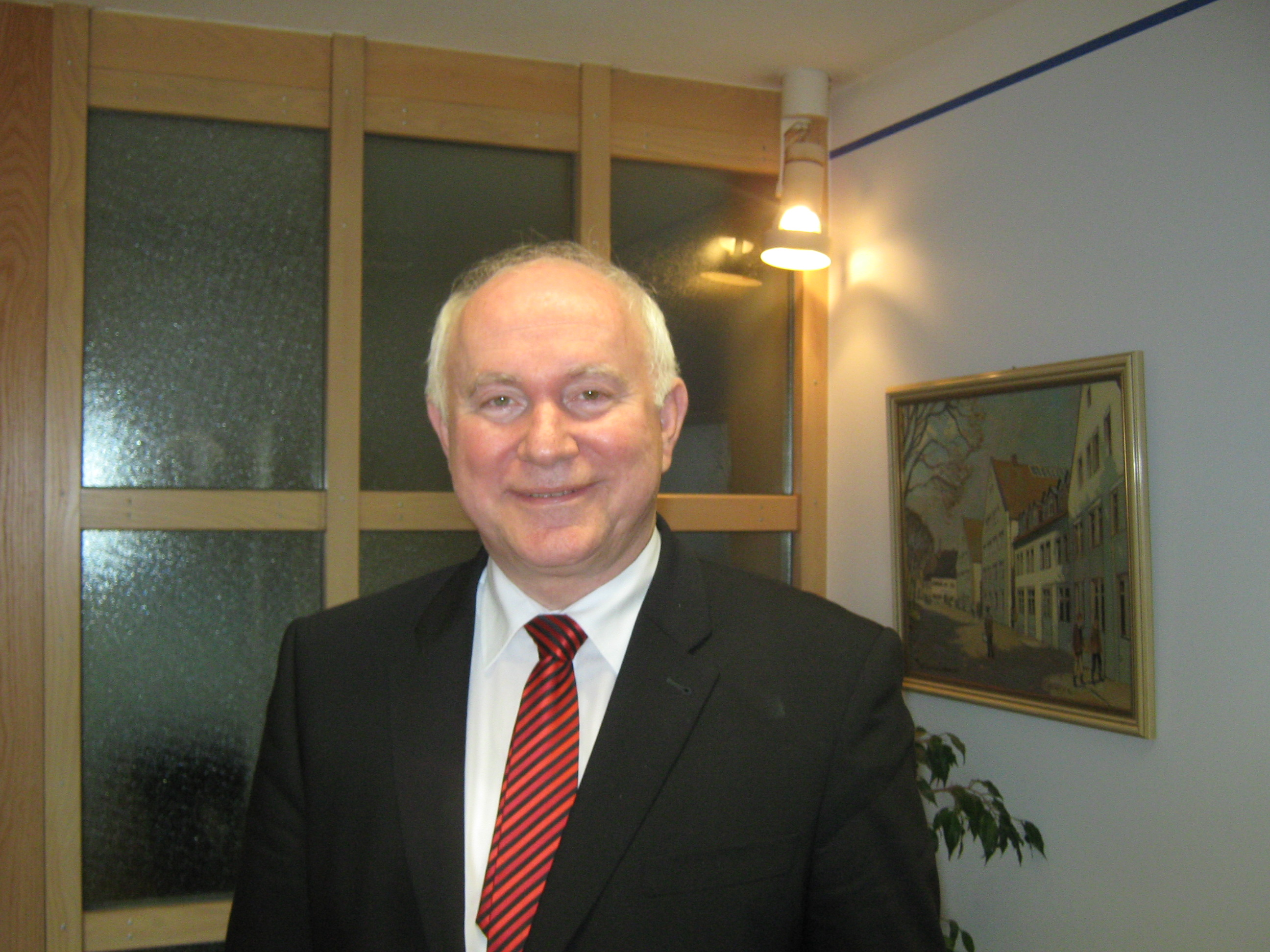 Heinrich Trapp, Landrat des Landkreises Dingolfing Landau, am Tag nach seiner letzten Wiederwahl, am 17. März 2014 im Vorzimmer zu seinem Büro